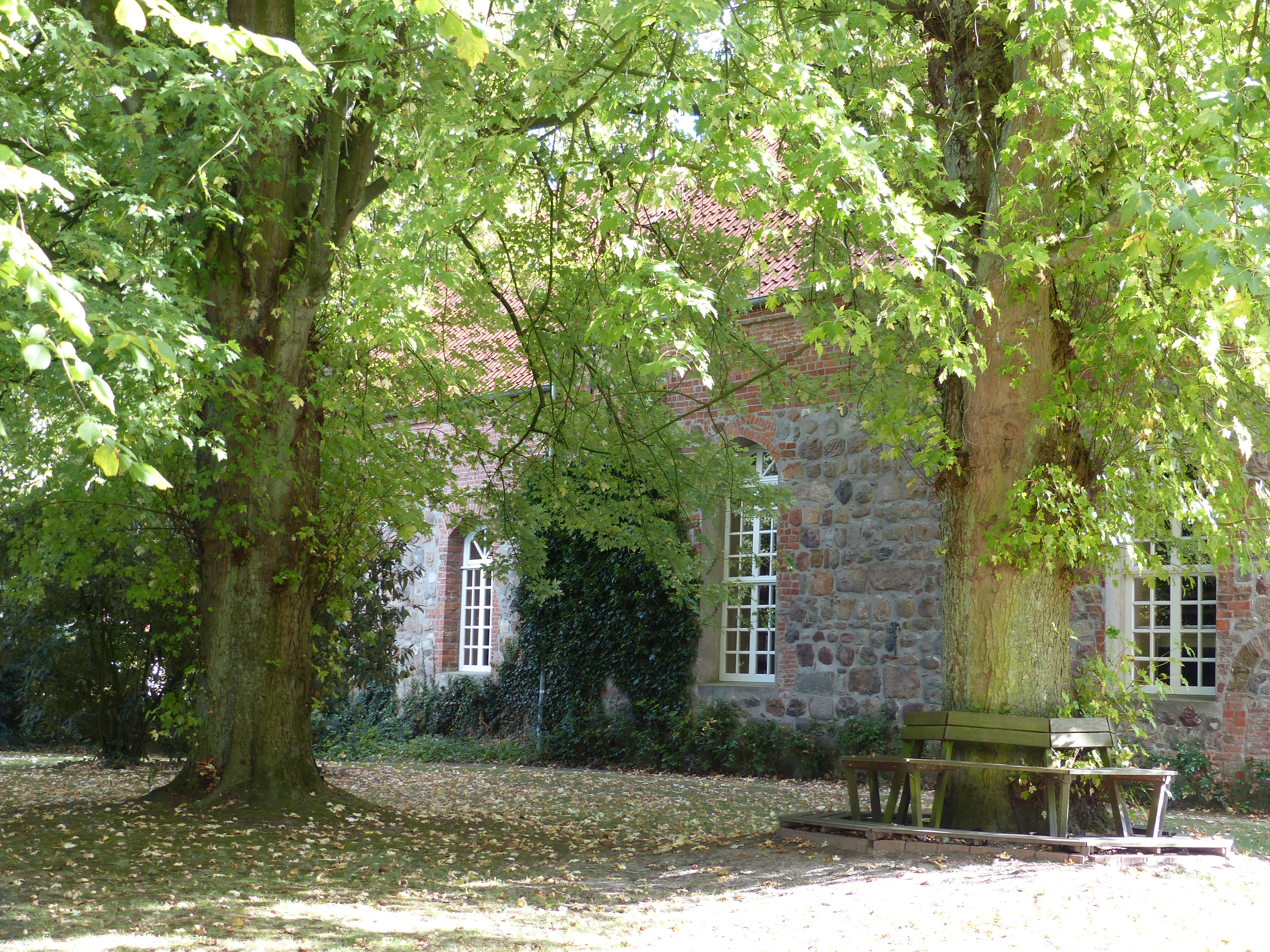 Nordseite der Wulsdorfer Kirche in Bremerhaven